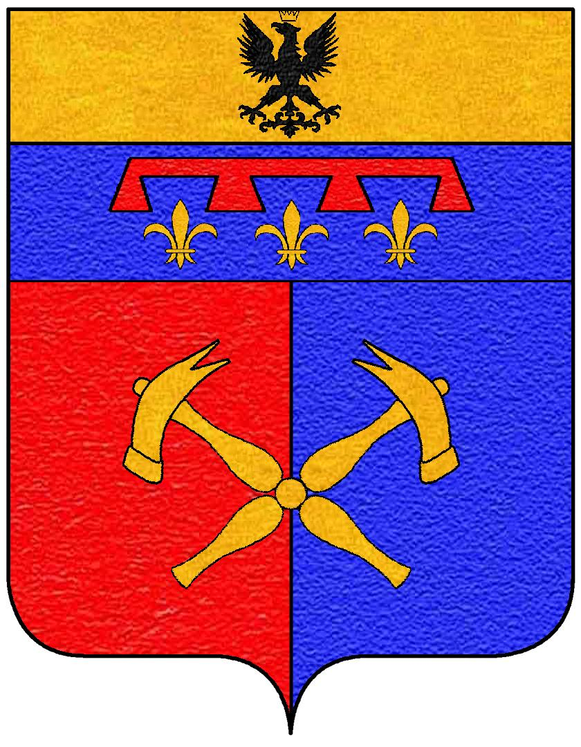 Stemma Sergardi: partito di rosso e d'azzurro, a due martelli d'oro, decussati e attraversanti; il tutto abbassato sotto il capo d'Angiò, il tutto abbassato sotto il capo dell'Impero